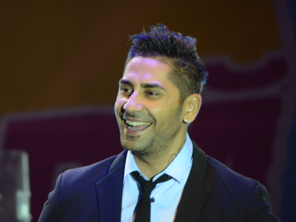 Connect-R (Ștefan Mihalache), la Mix Music Evolution 2012, București